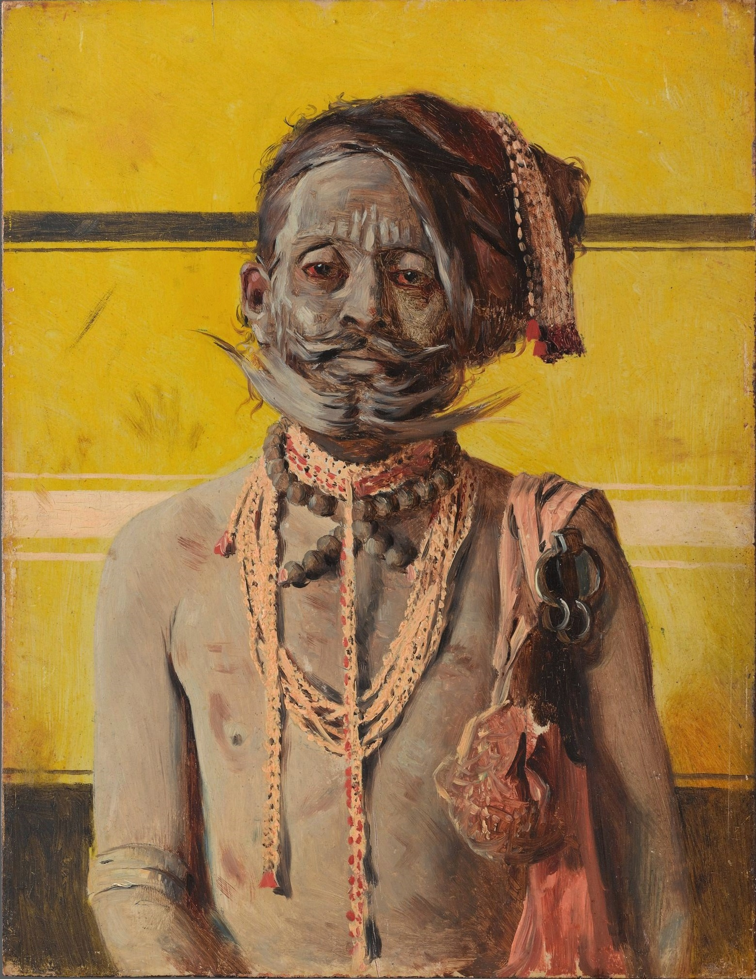 Факир